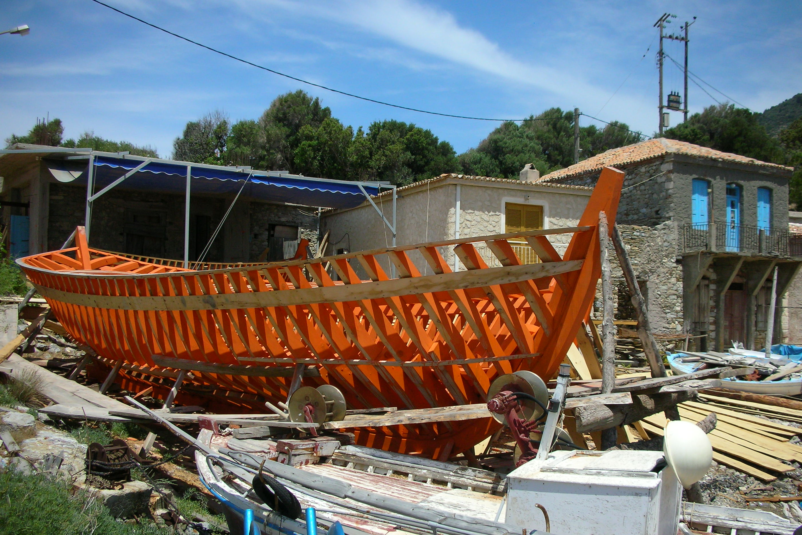 Samos, Agios Isidoros, Kaikiawerft